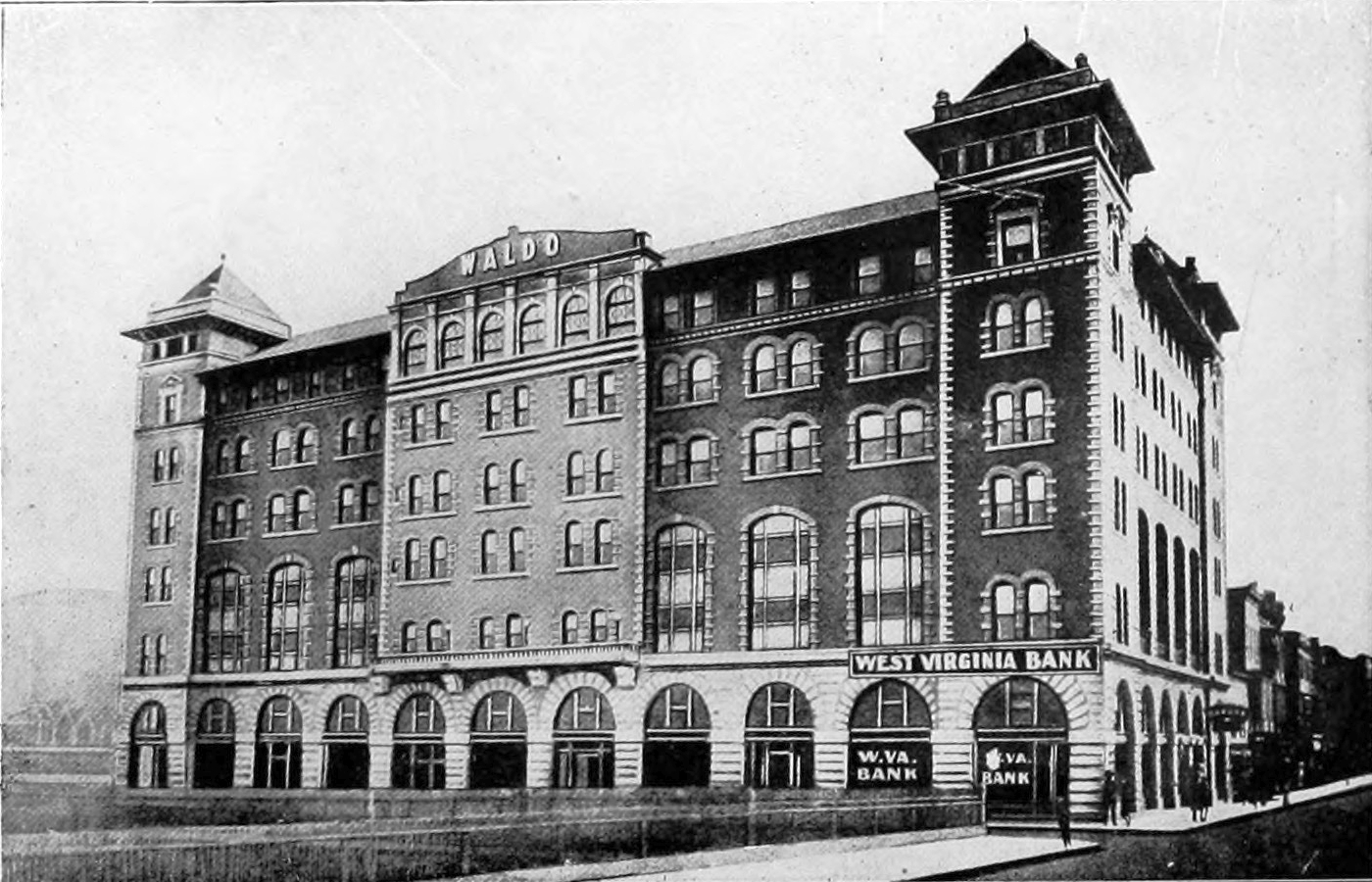 Waldo Hotel, Clarksburg, West Virginia (1918).